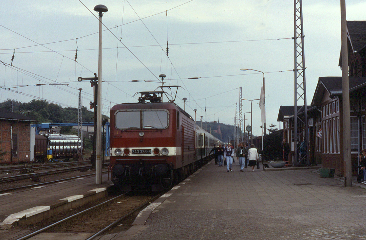 Deutsche Reichsbahn class 243 (later 143) electric loco no. 243.326 at Saßnitz on 30 September 1991.